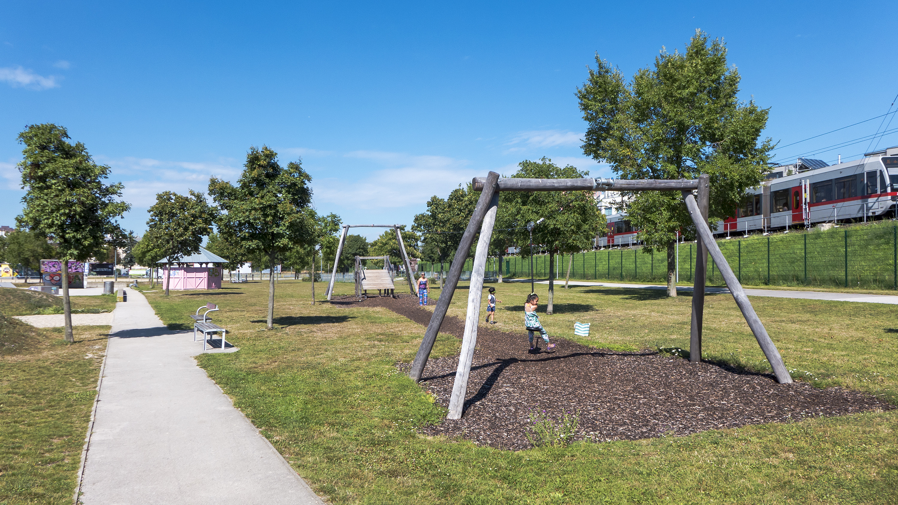 PaN-Park in Wien 23